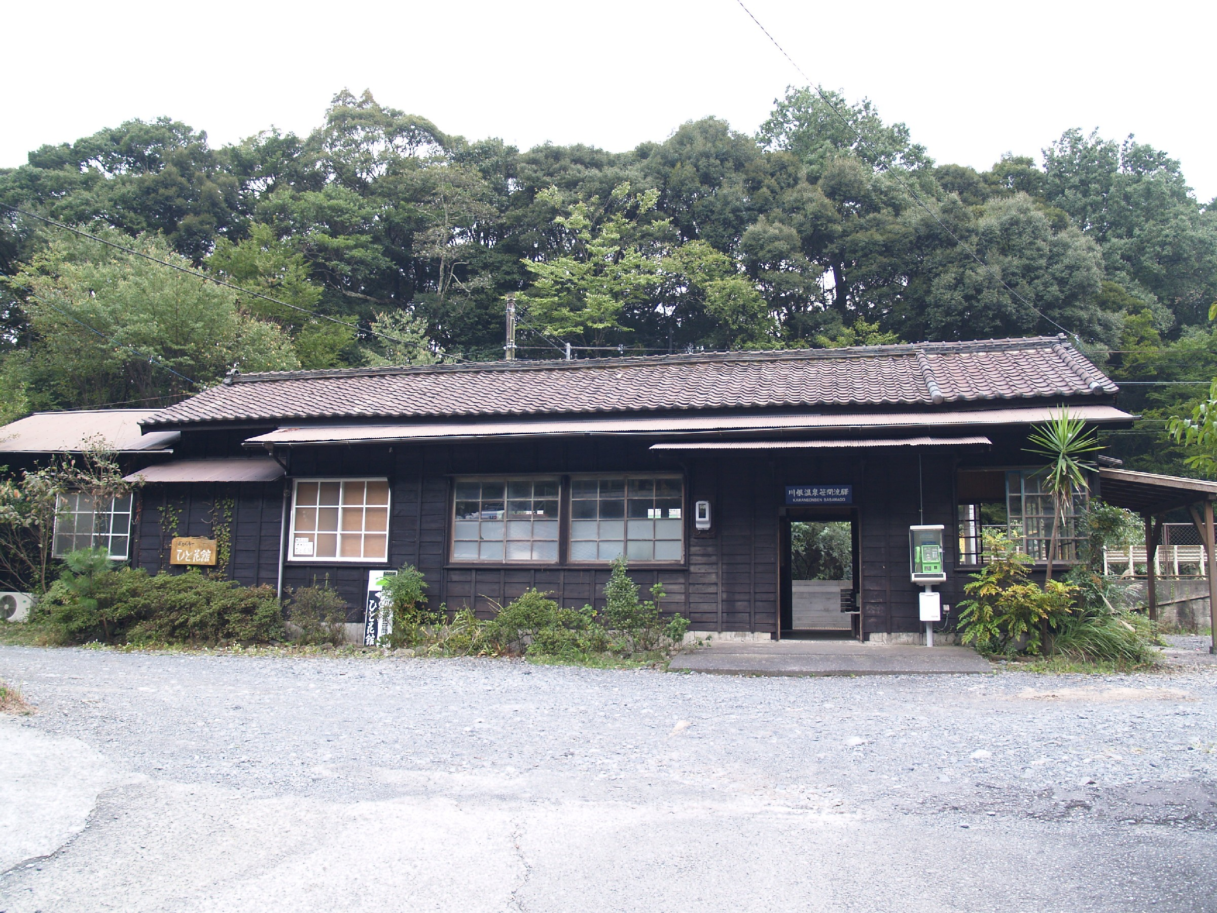 川根温泉笹間渡駅駅舎